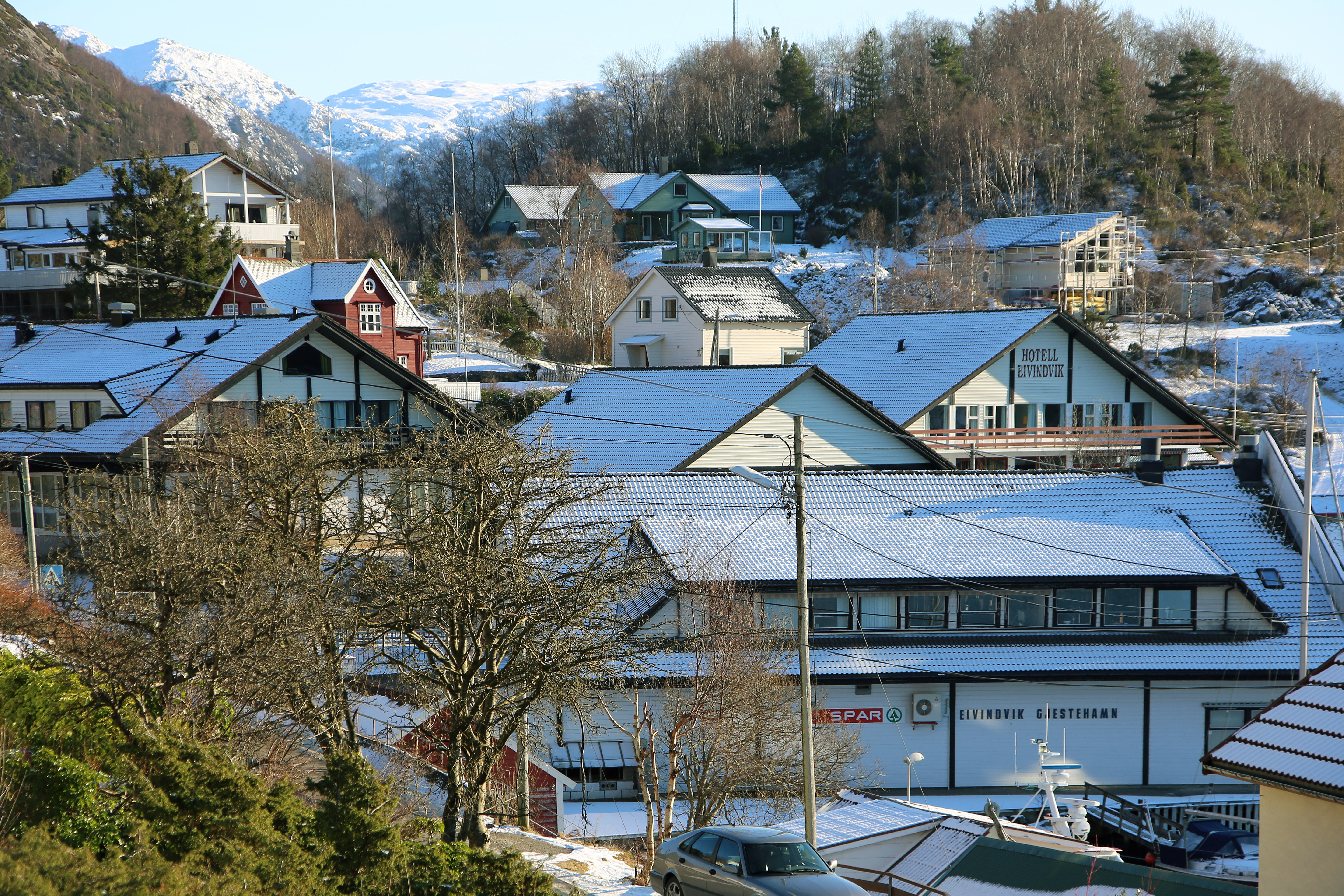 Eivindvik, bank, butikk, hotell